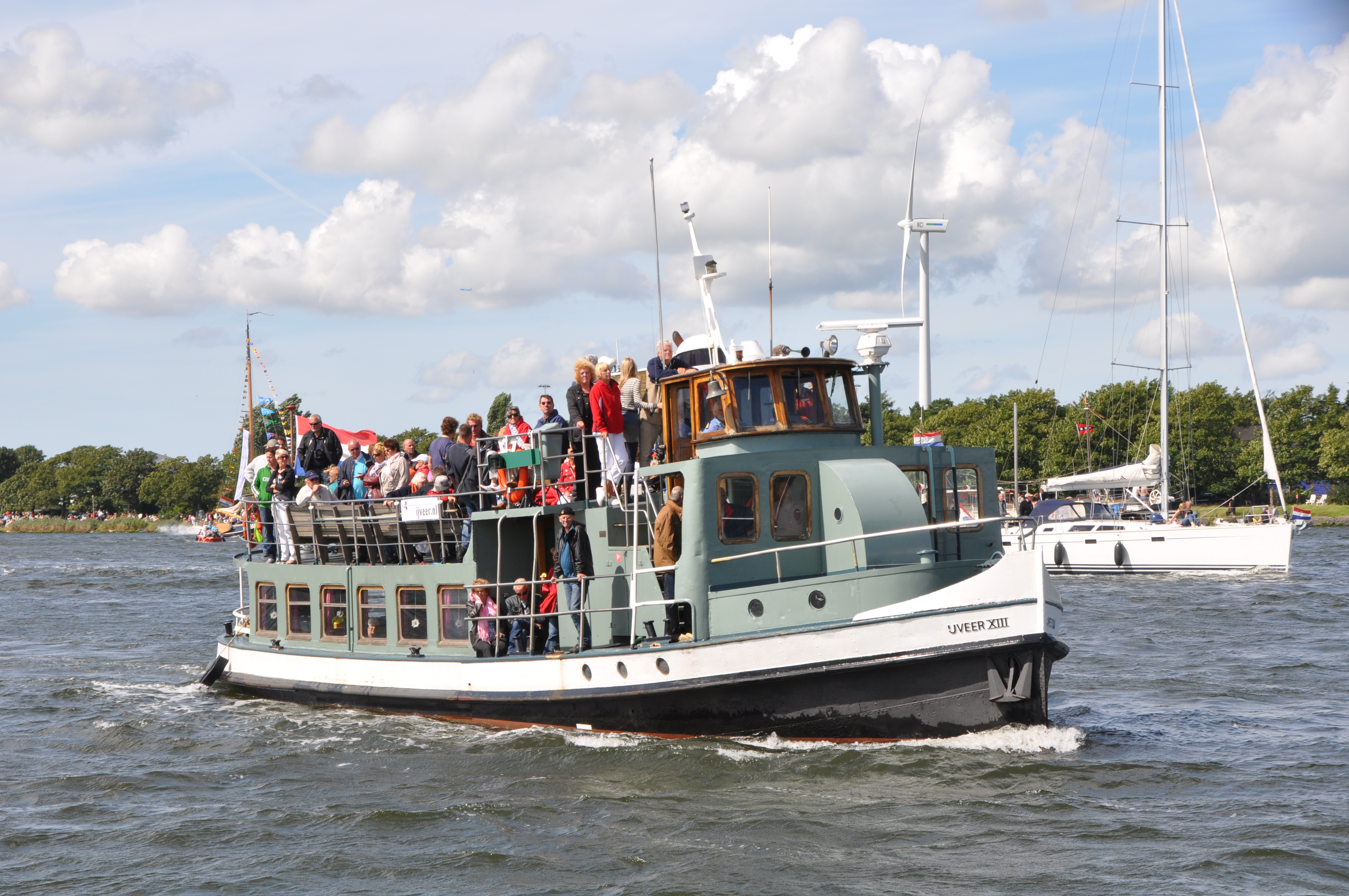 Een foto van de Sail-in parade van Sail Amsterdam 2010.